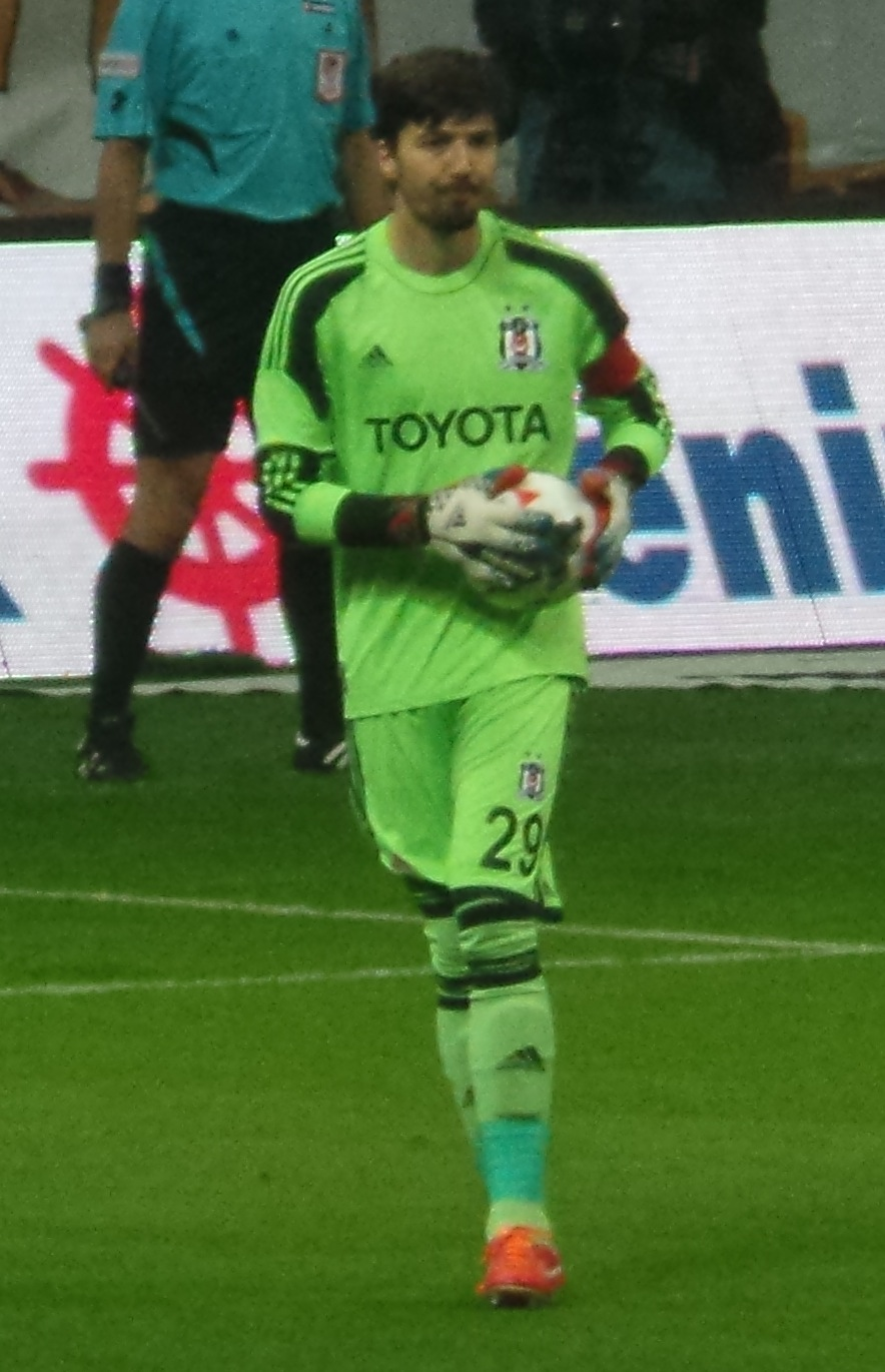 Tolga Zengin'14